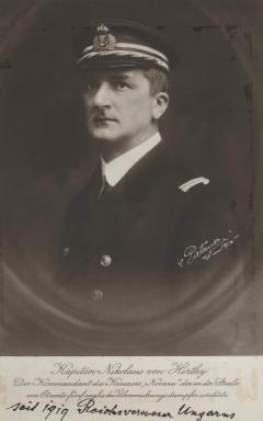 Miklós Horthy con uniforme de capitán de navío en 1916.